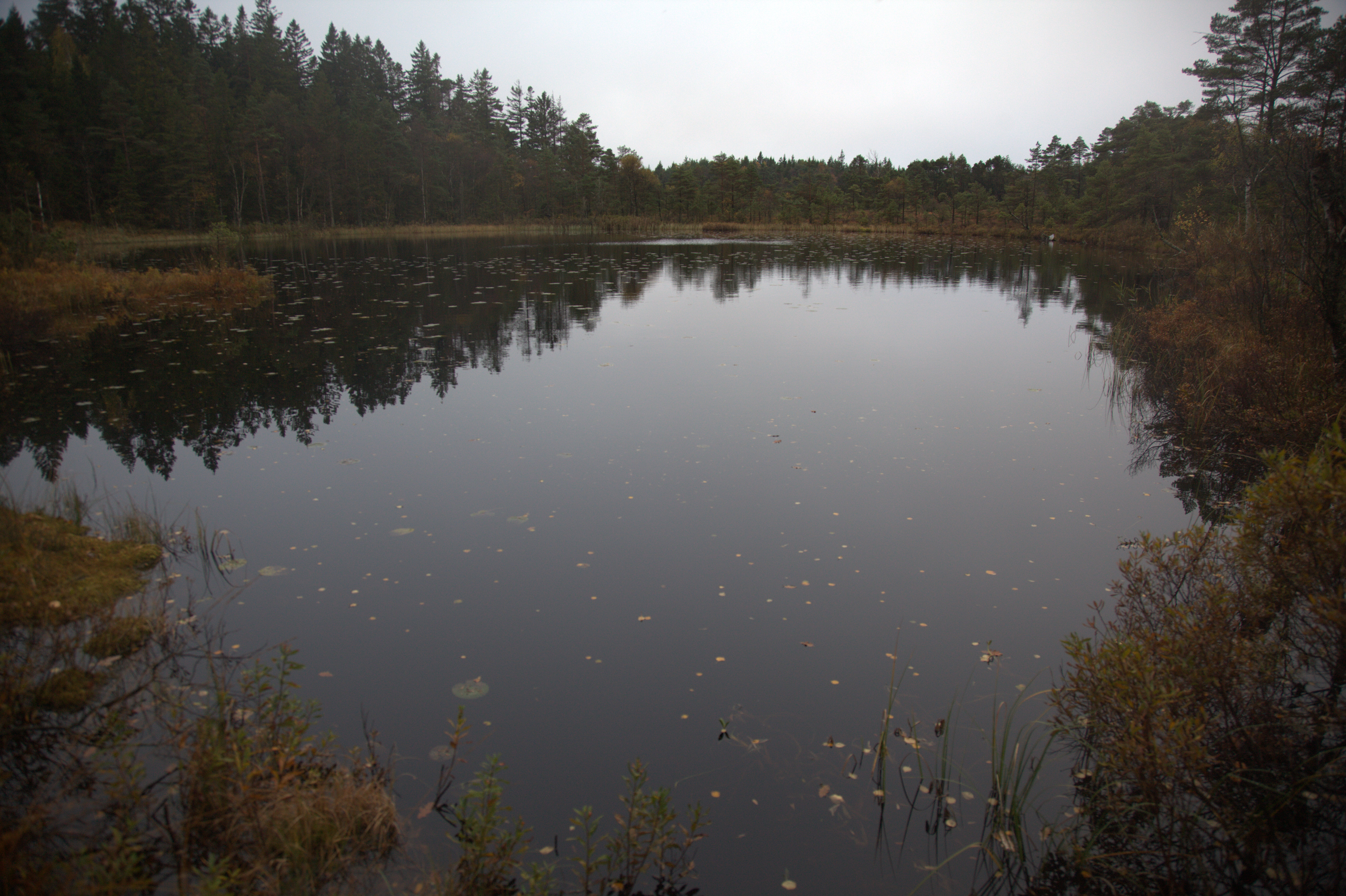 Oxögat i Kungälvs kommun